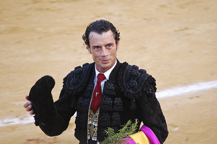 Le matador Finito de Córdoba lors d'une vuelta en 2010